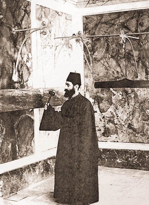 נאקוס ארמני בכנסיית סנט ג'יימס